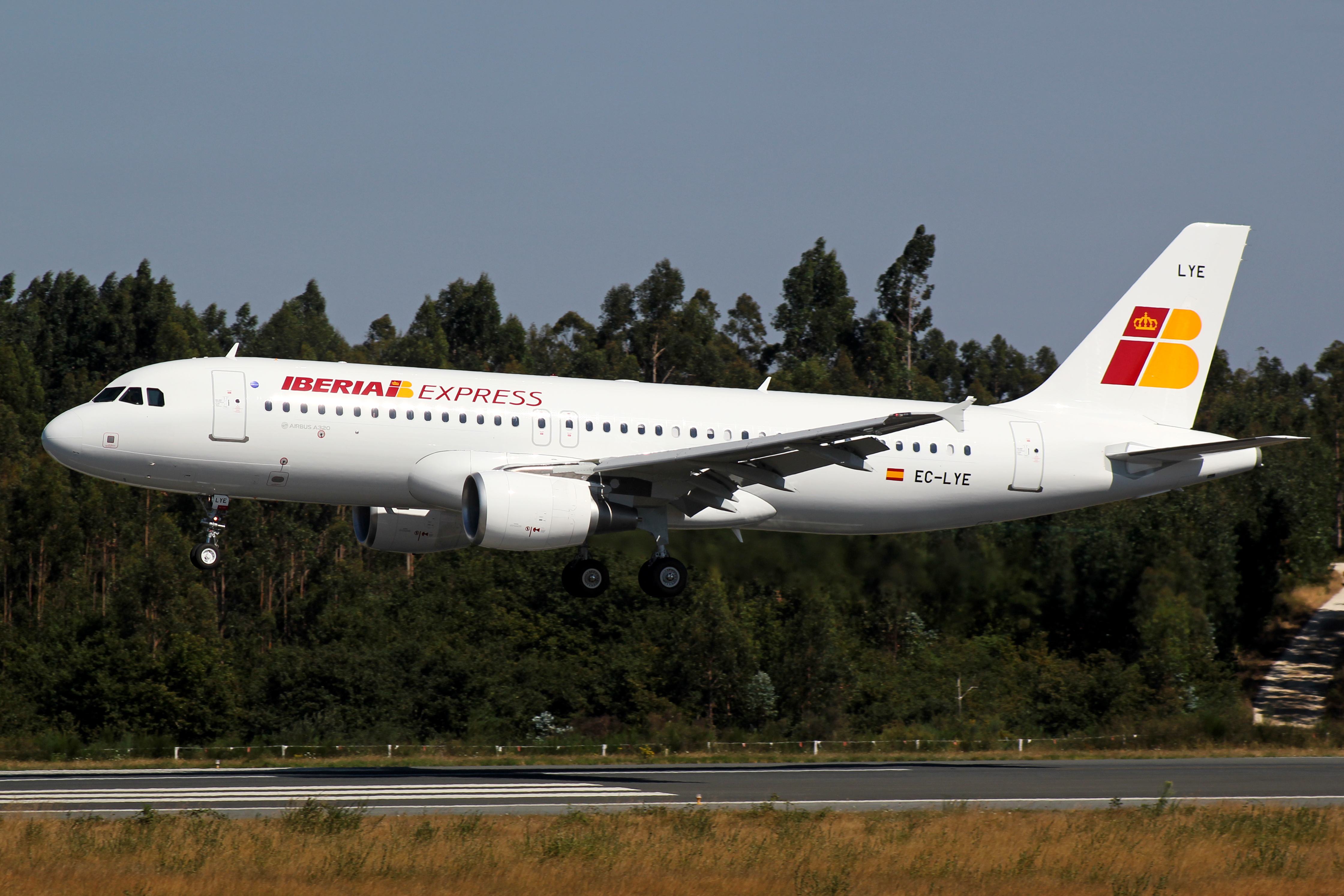 Airbus A320 de Iberia Express aterrando no aeroporto de Santiago de Compostela.